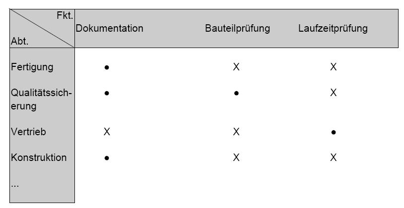 matrixdiagramm